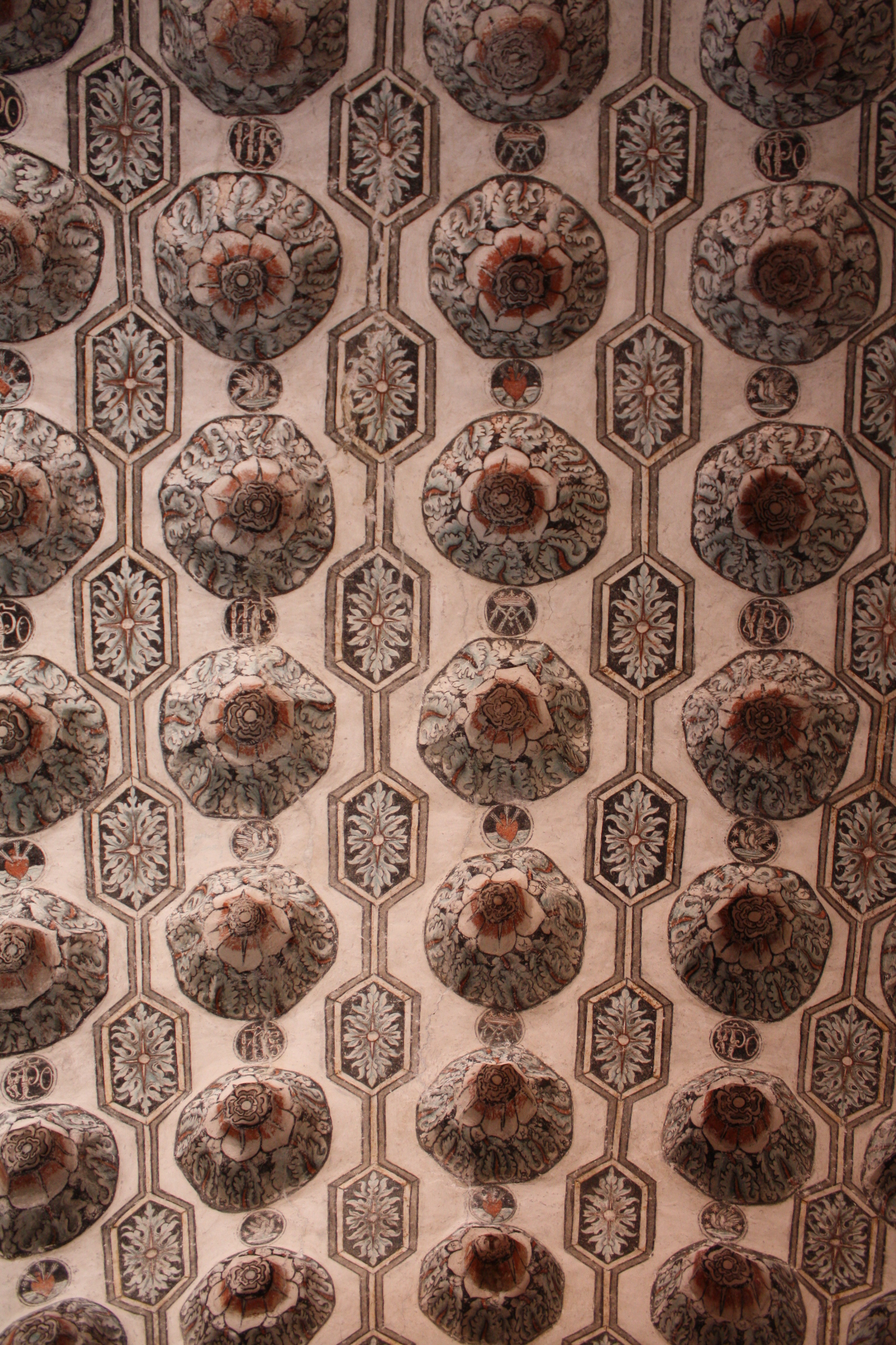 Convento de Actopan